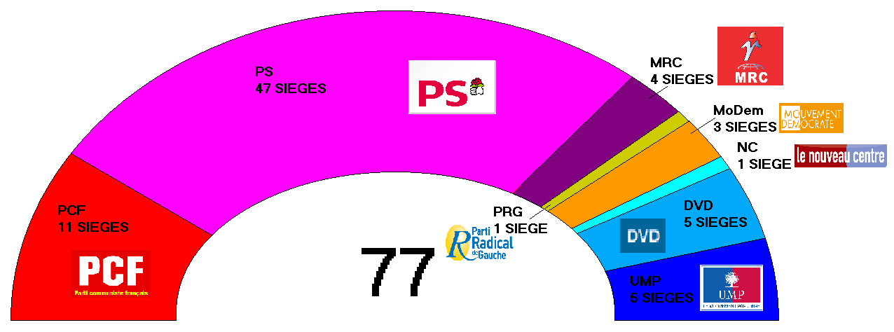 Hémicycle du Pas-de-Calais en 2011.